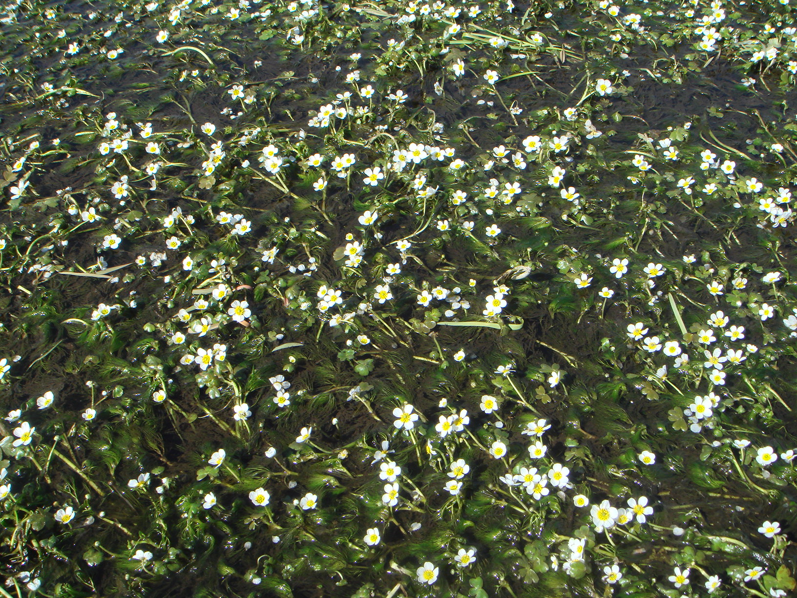 Ranunculus peltatus Schrank subsp. peltatus. La Torre (Ávila), España.